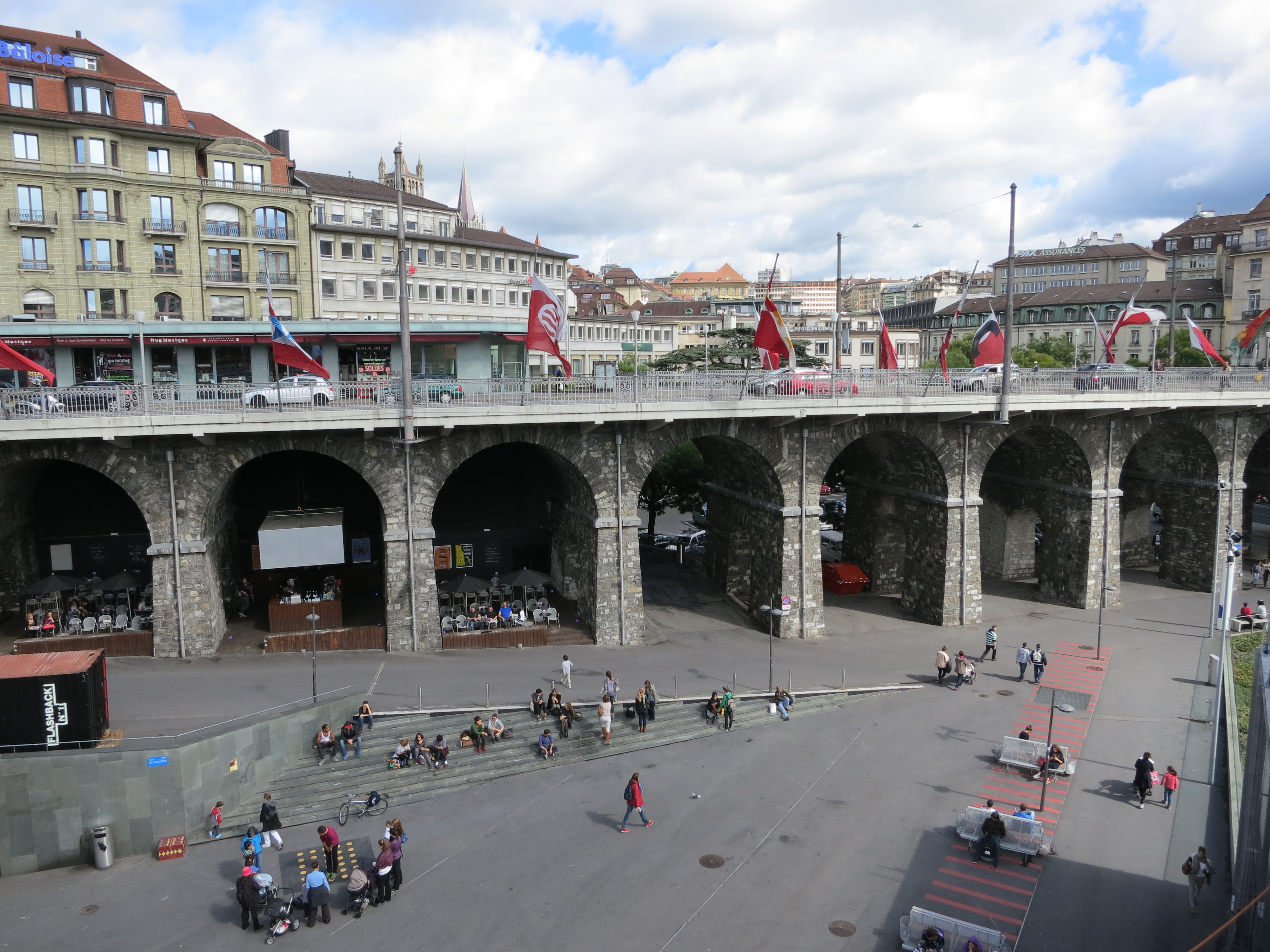 Grosse Brücke (Grand Pont)